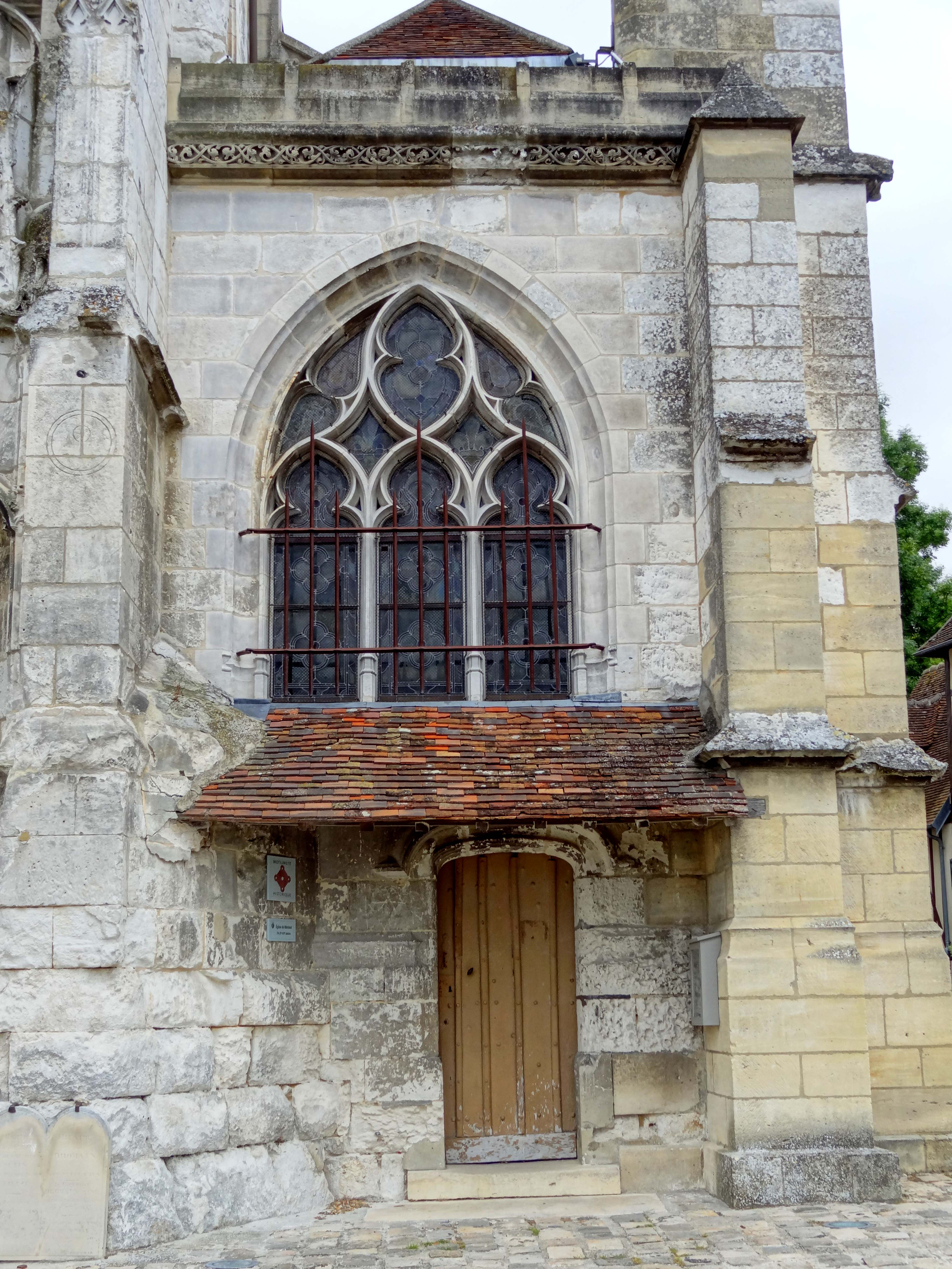 Église Notre-Dame de Marissel - voir titre.